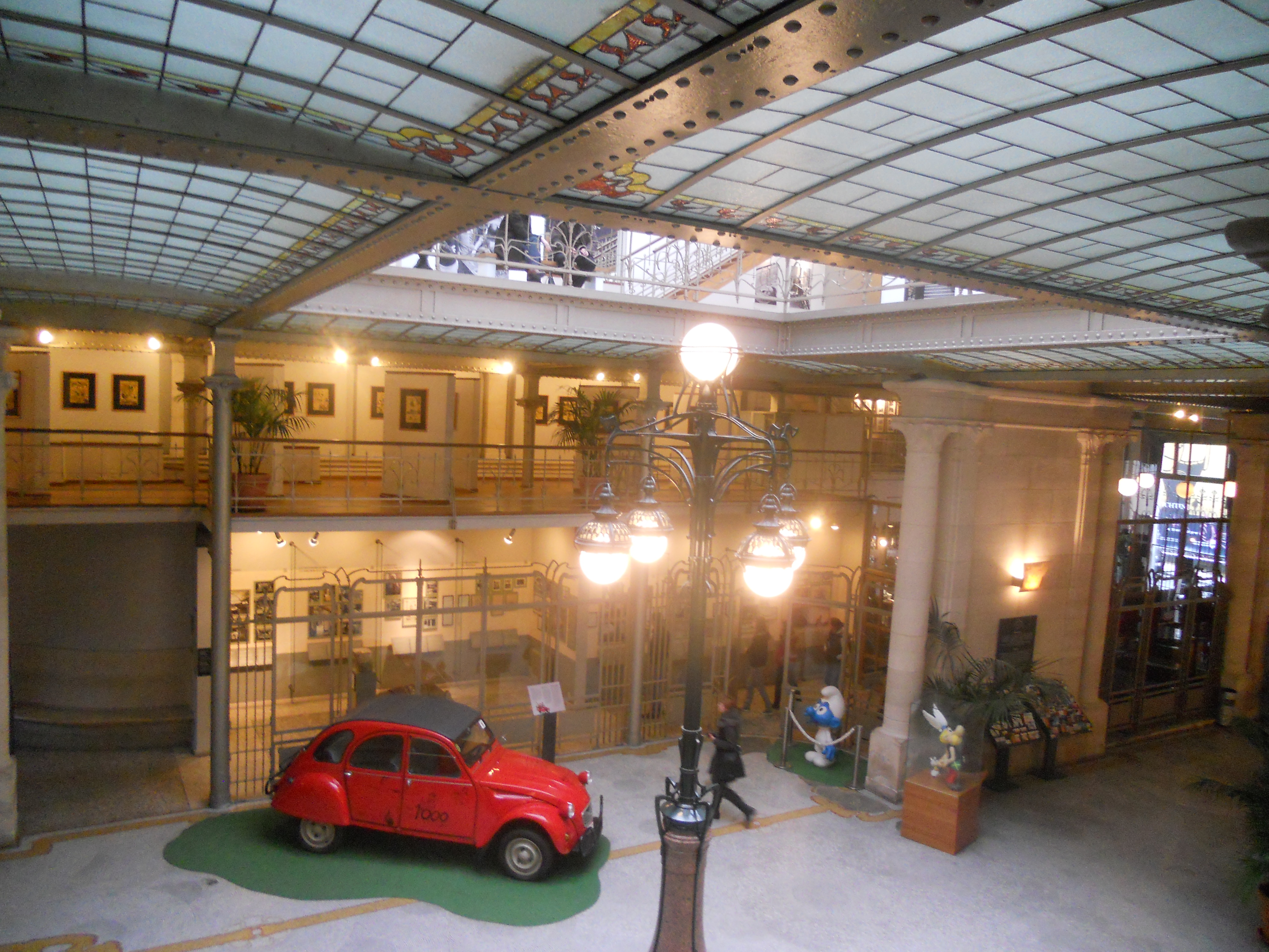 Comics Museum